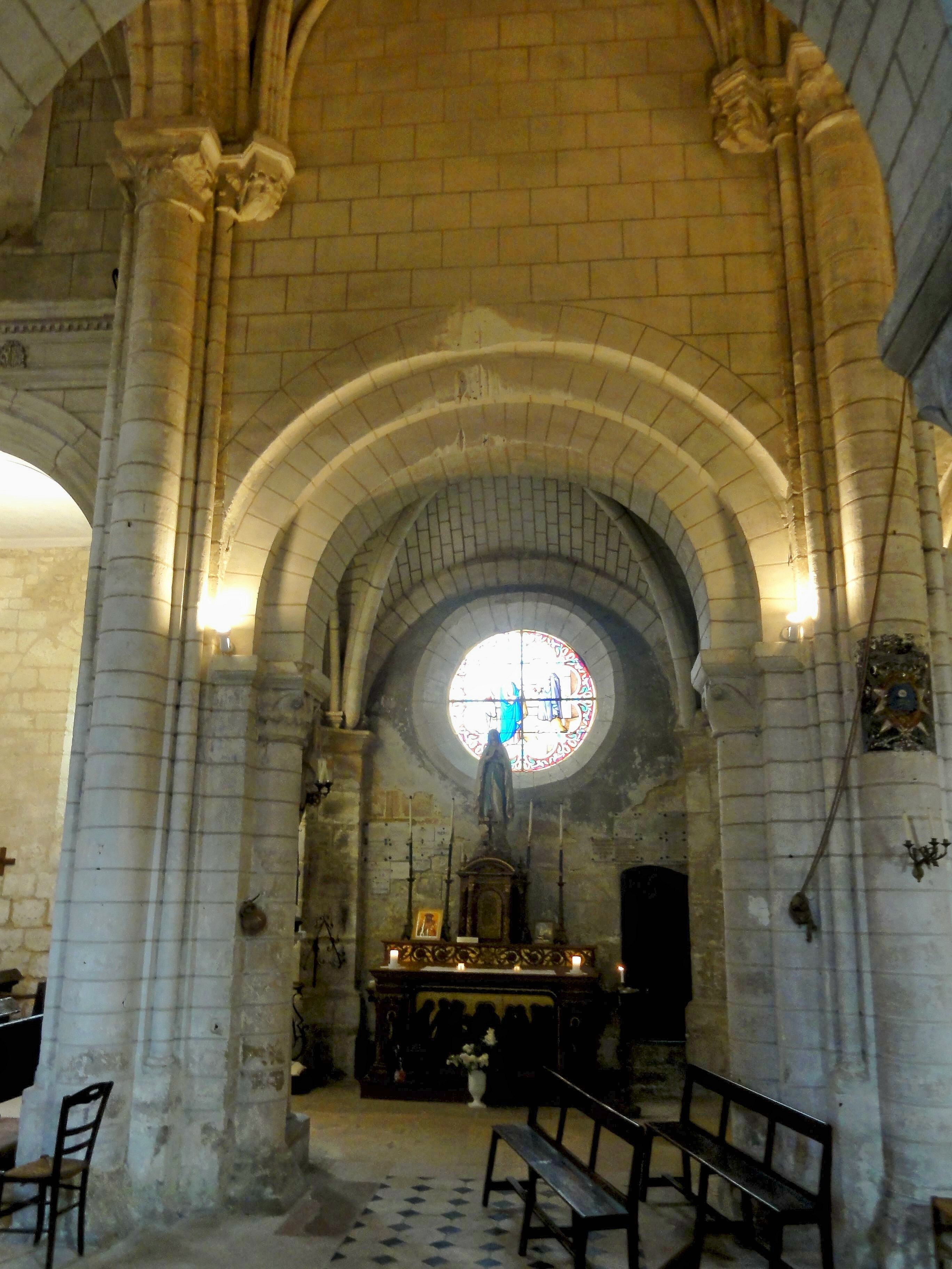 Ancien transept, vue nord-sud.